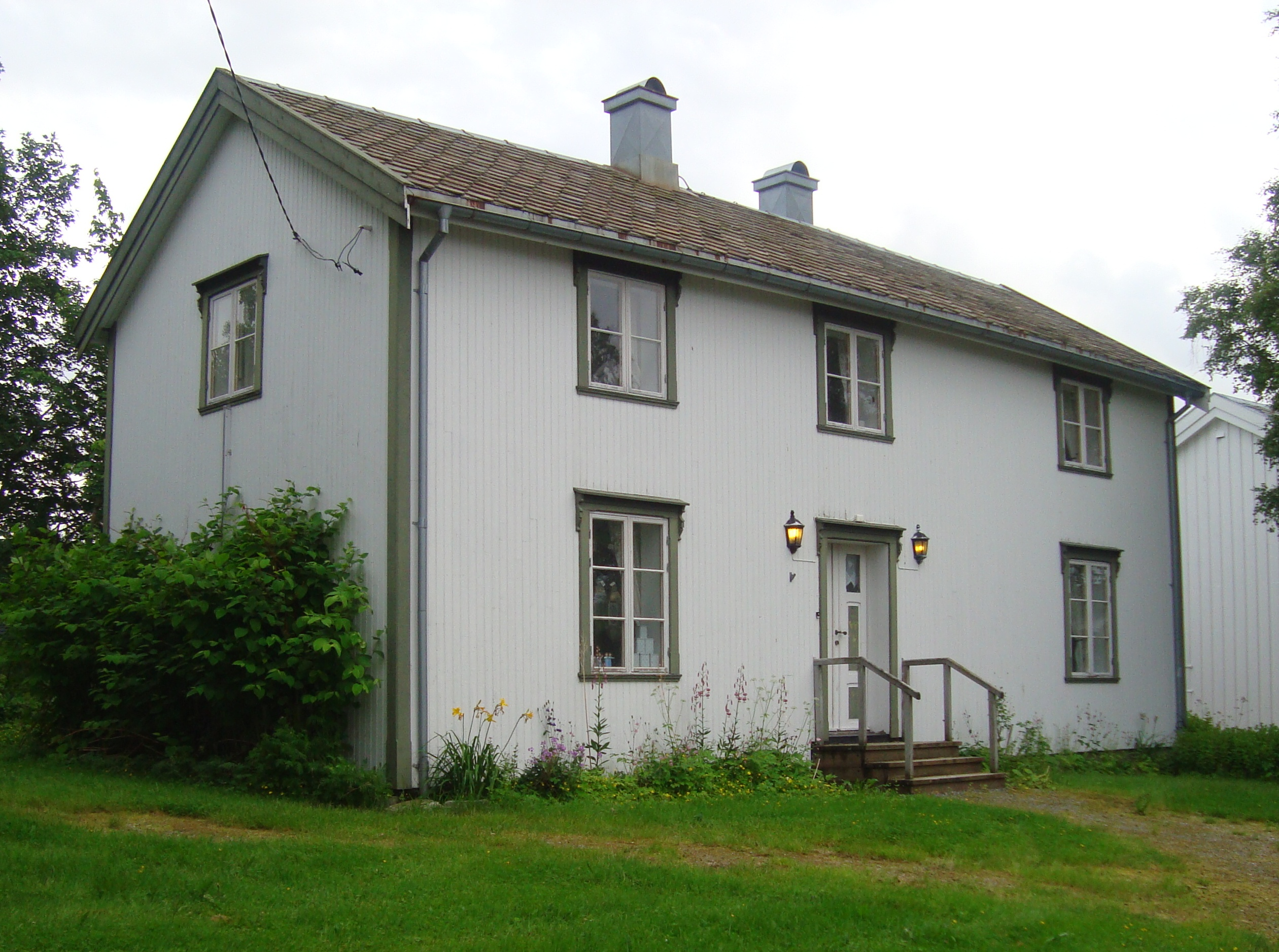 Klokkergården på Nesna, bygg fra 1823 tidligere brukt som skole, nå museum